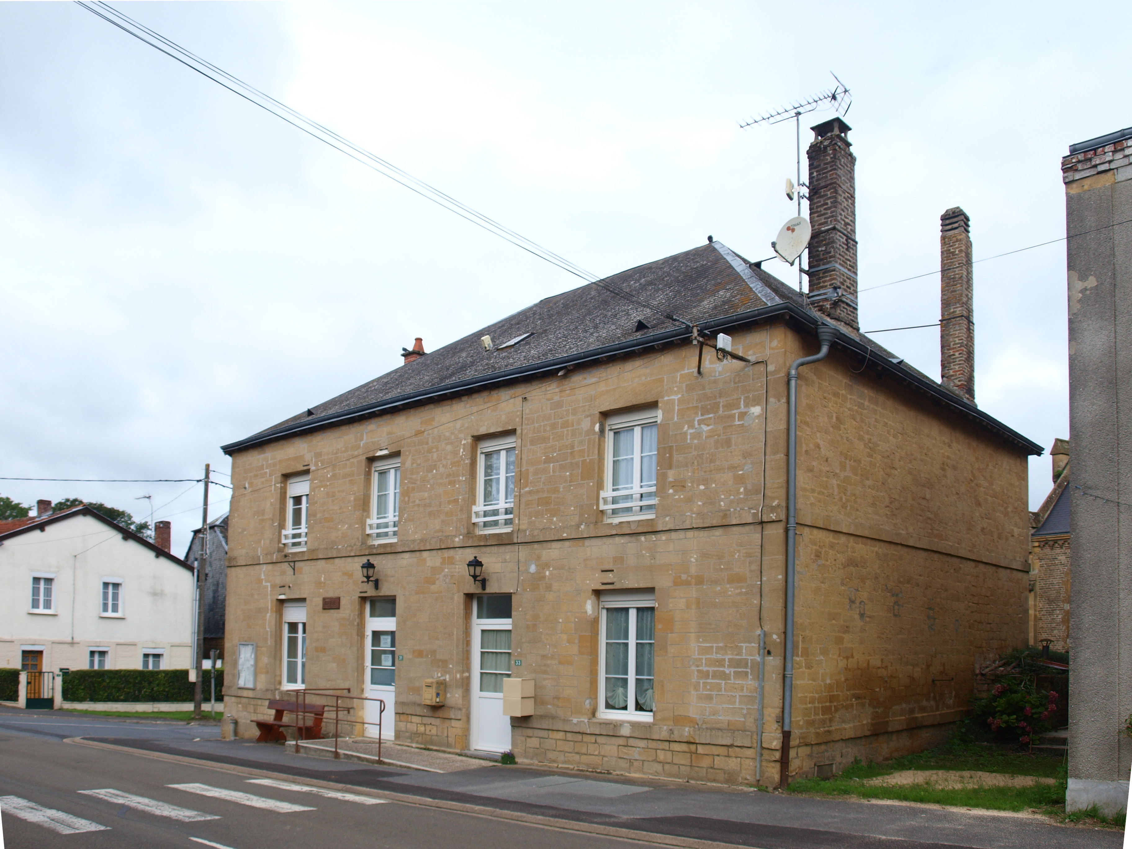 La Croix-aux-Bois (Ardennes, France) ; mairie